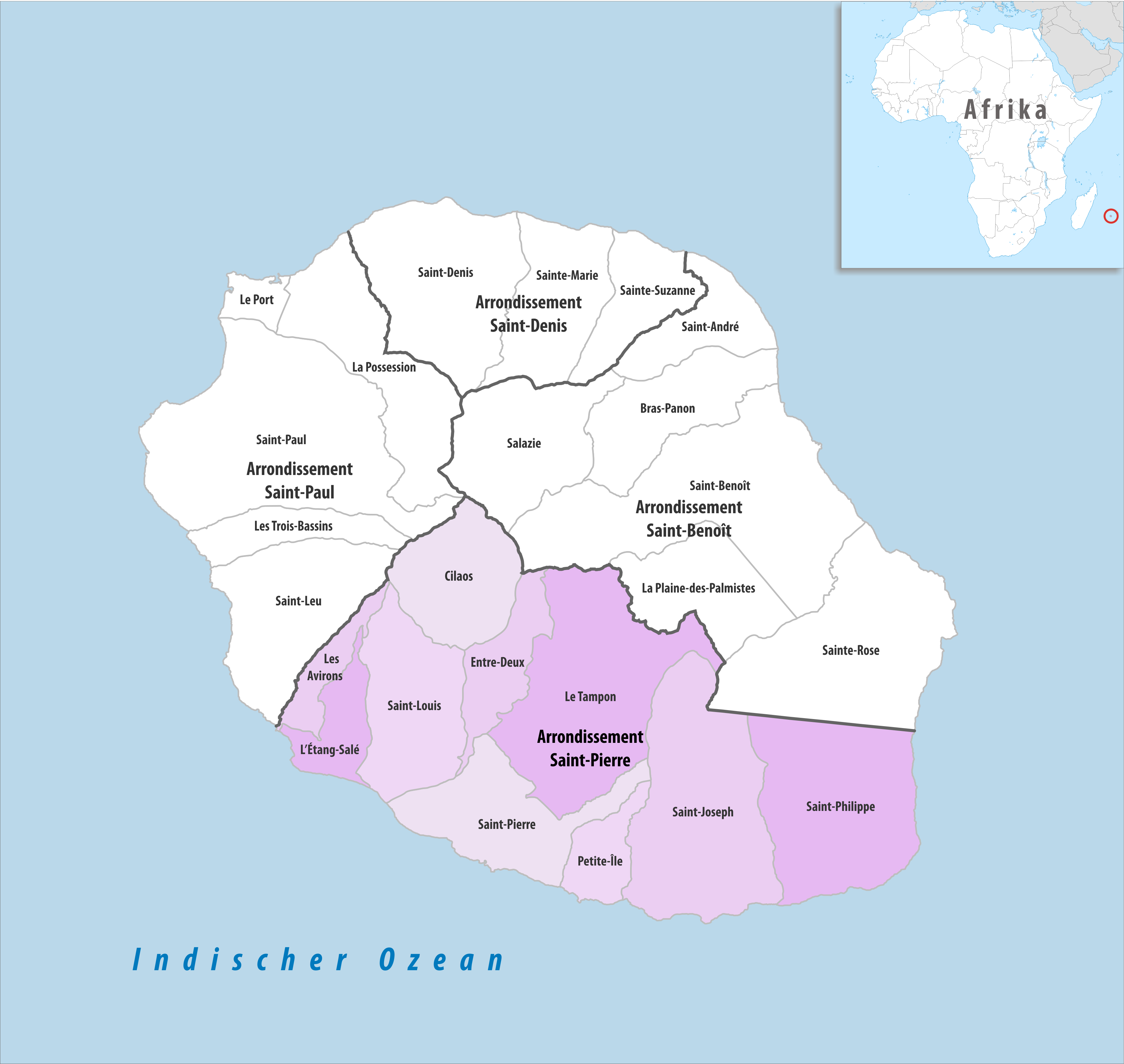 Lage des Arrondissements Saint-Pierre